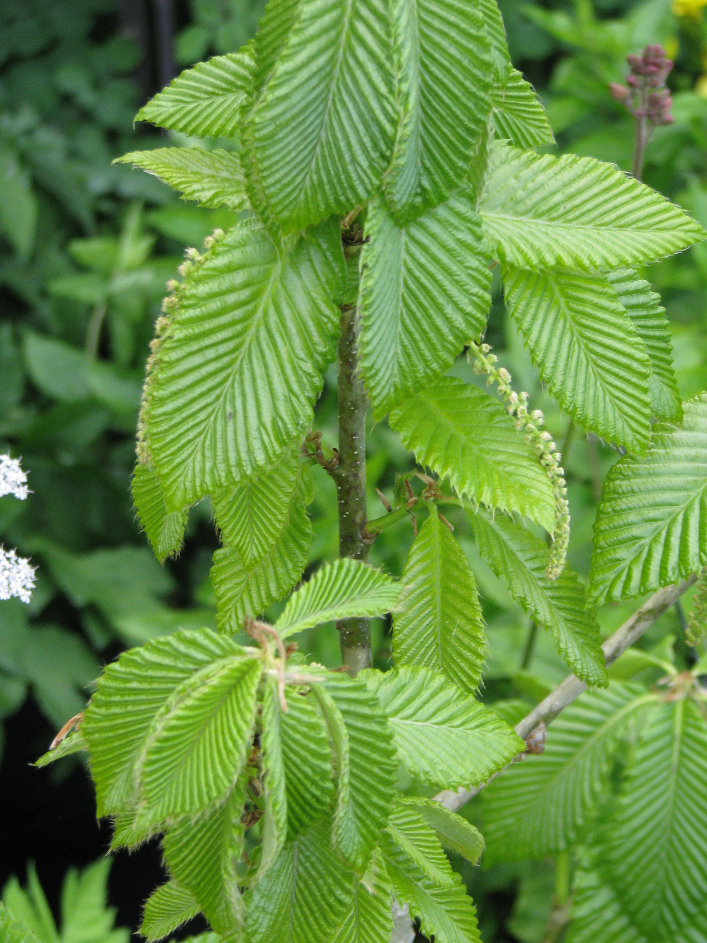 Quercus pontica